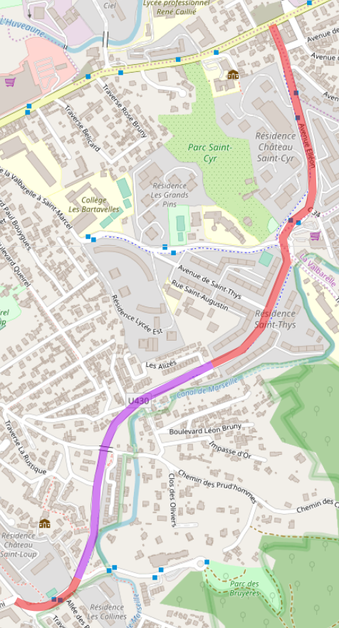 La voie U430 (dans le quartier Saint-Loup à Marseille 10e), tracée sur un fond de carte OpenStreetMap. En violet : l'avenue Adrienne Ranc-Sakakini. En rouge les autres voies constituant la U430 : au nord, l'avenue Elléon (longeant la résidence du Château Saint-Cyr), un dernier segment du CR 34 (chemin rural de la Valbarelle à Saint-Marcelle) en bordure du quartier de la Valbarelle (dans le 11e arrondissement), et l'avenue du Corps expéditionnaire français (traversant la résidence Saint-Thys) ; au sud, un dernier segment de la rue des Trois Ponts (jusqu'au château Saint-Loup).